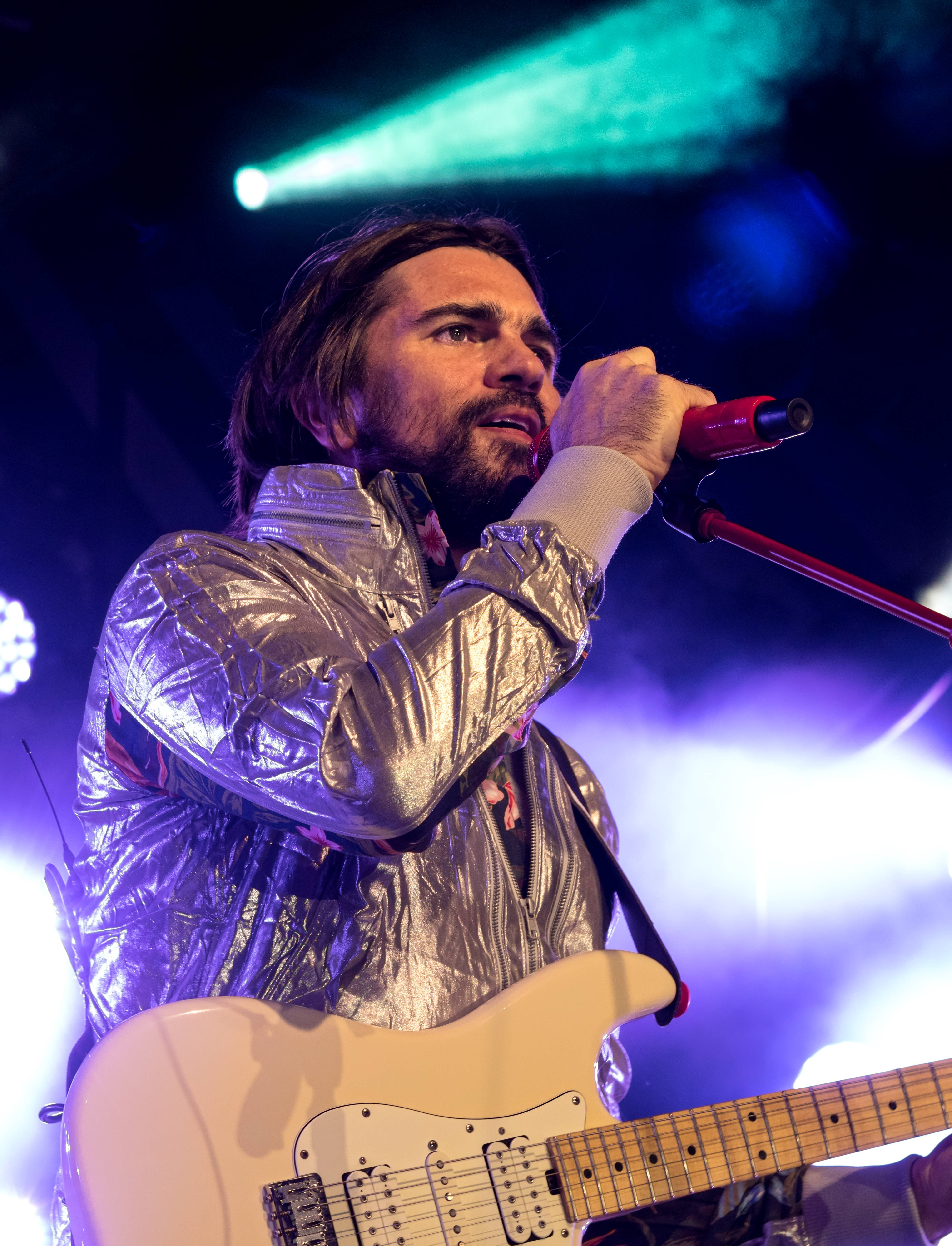 Bilder vom ZMF 2015 JUANES am 18. Juli 2015